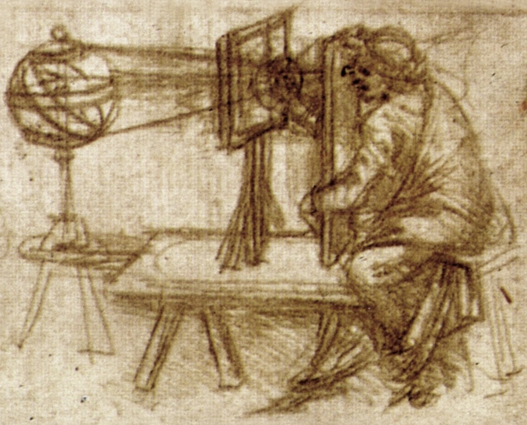 Prospettografo